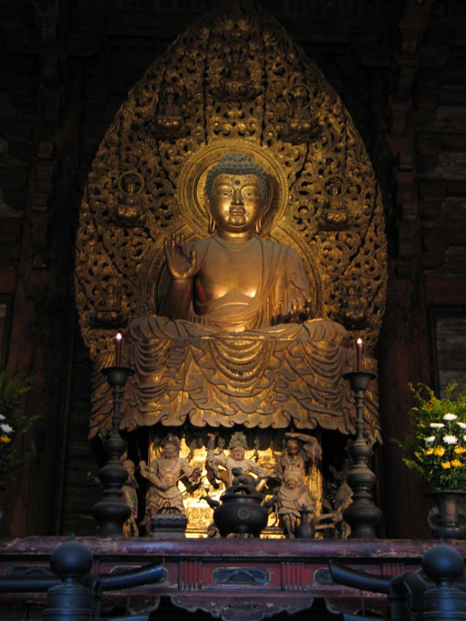 Statue de Yakushi-nyorai, Kon-dō, Tō-ji Temple - Kyōto